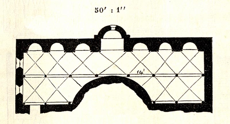 Holzschnitt aus den Mittheilungen der kaiserl. königl. Central-Commission zur Erforschung und Erhaltung der Baudenkmale Band 5, 1860. Beitrag von Wilhelm Lübke mit dem Titel: „Reisenotizen über die mittelalterlichen Kunstwerke in Italien“, 1858/1859, gemeinsam mit Karl Schnaase Druck: k. k. Hof- und Staatsdruckerei Zuordnung der Zeichnungen entsprechend dem Dateinamen